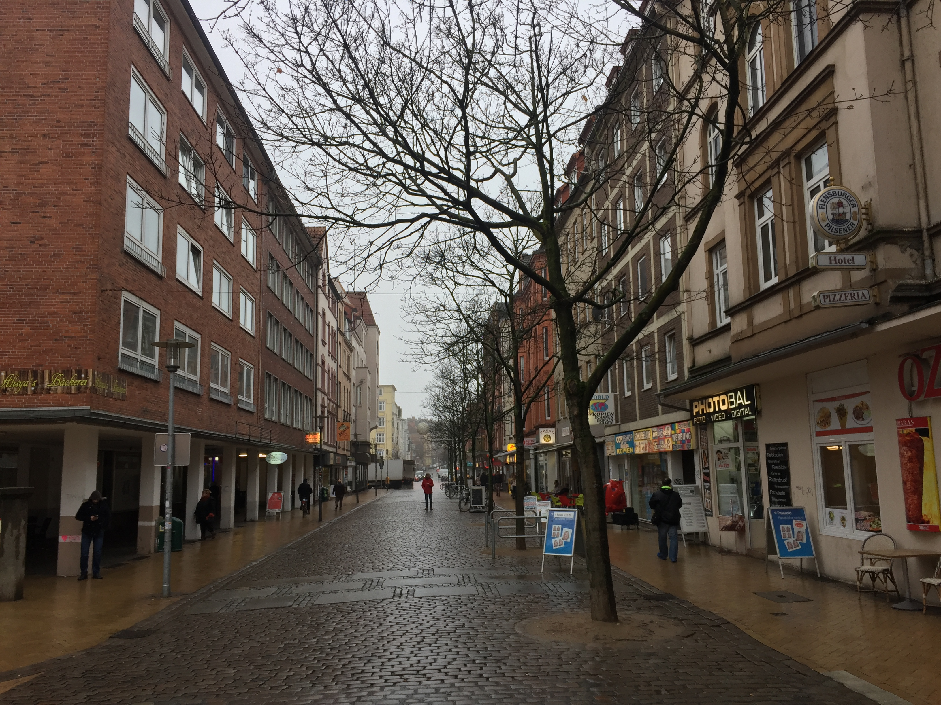 Kiel-Gaarden, Blick in die Fußgängerzone Elisabethstrasse